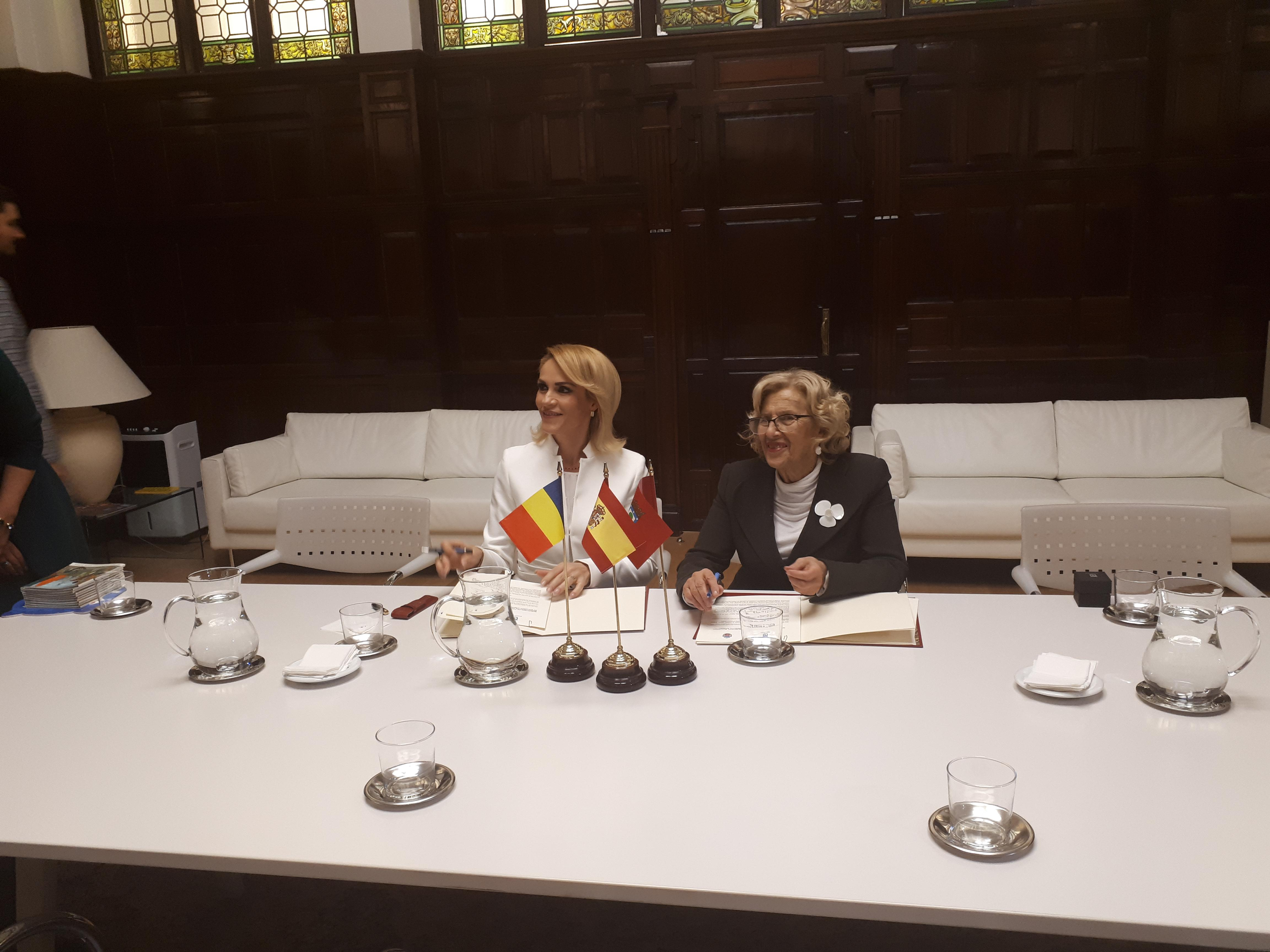 La alcaldesa de Madrid, Manuela Carmena, y Gabriela Firea, alcaldesa de Bucarest (Rumanía), se han reunido esta tarde en el palacio de Cibeles, donde han firmado un memorando de colaboración entre sus respectivos Ayuntamientos.